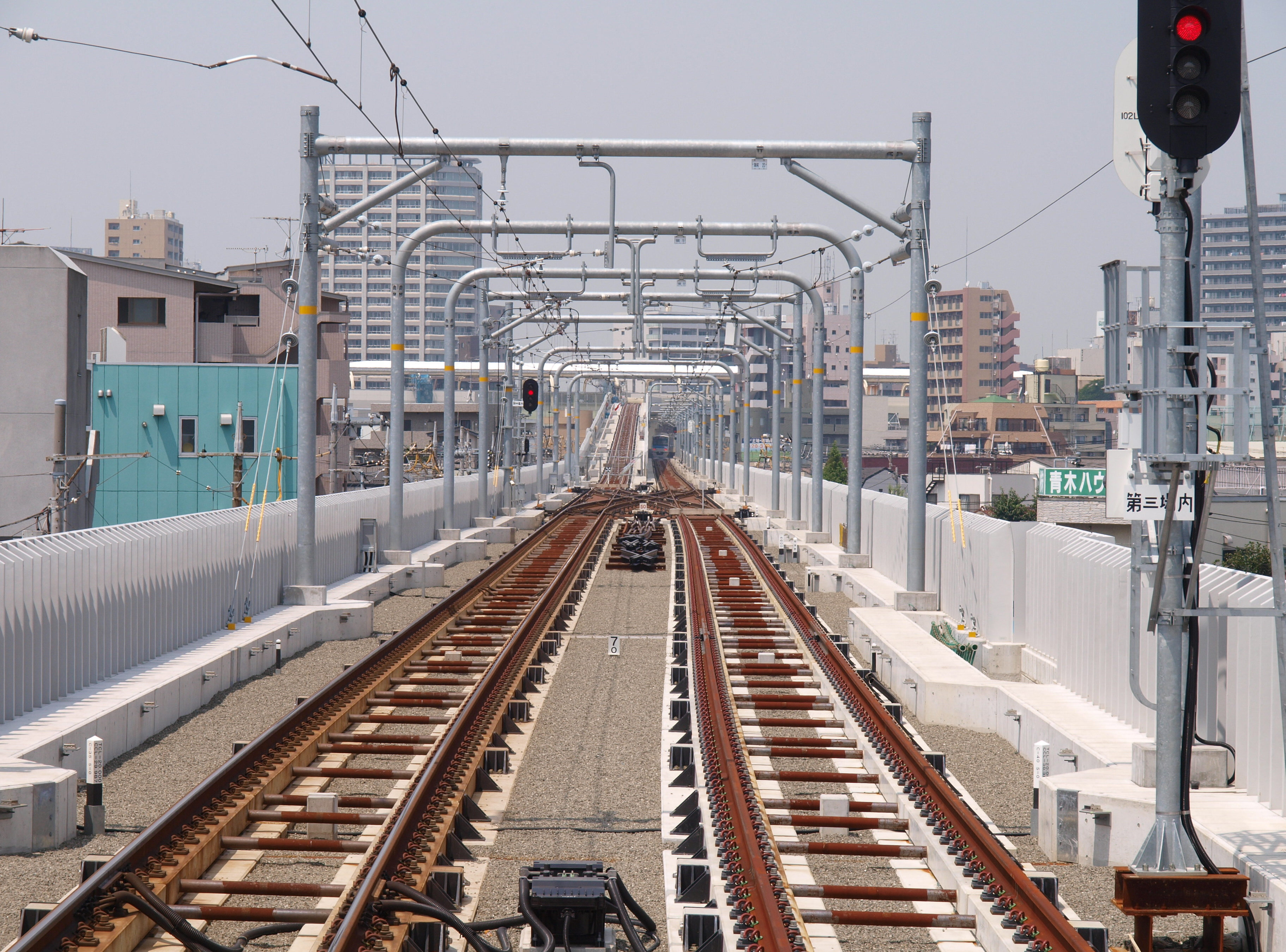 京急蒲田駅 - 糀谷駅間に設置された分岐器。2010/8/16現在未使用。